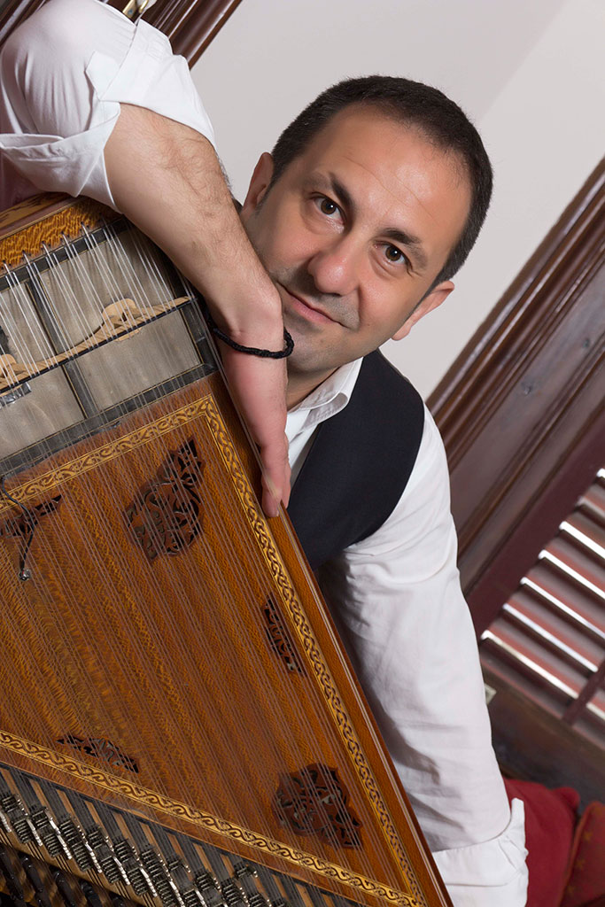 Bora Dicle'nin albüm çalışmaları sırasında çekilmiş fotoğrafı.